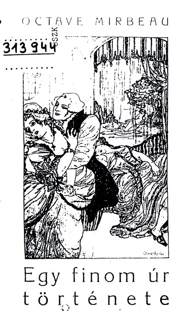 Traduction hongroise de Un homme sensible, d'Octave Mirbeau (1848-1917)